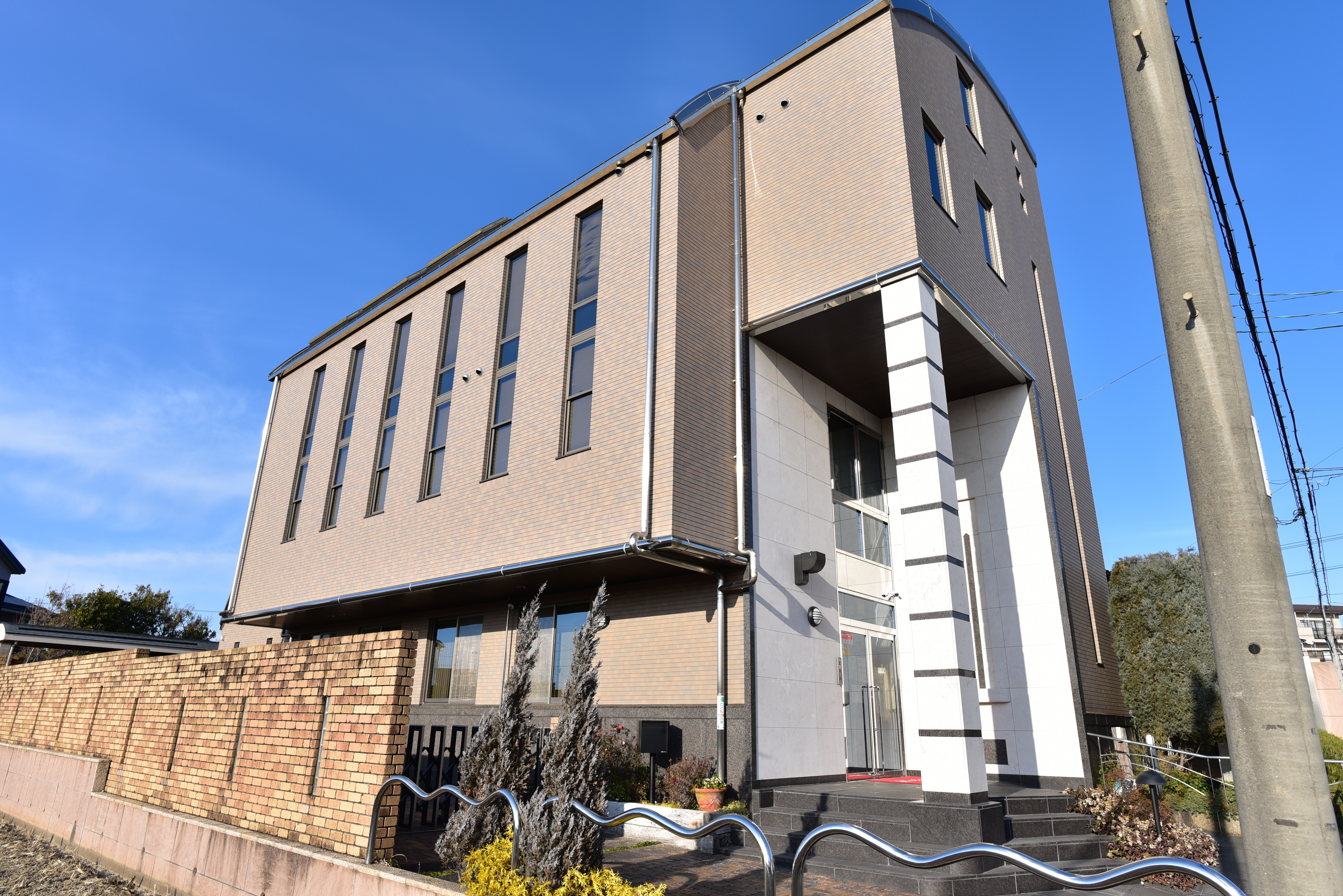 アイ・ファイン（イチロー展示ルーム） Nikon D750